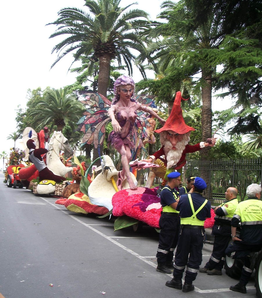 I carri della Battaglia di Fiori aspettano l'ora della sfilata nel centro della città.